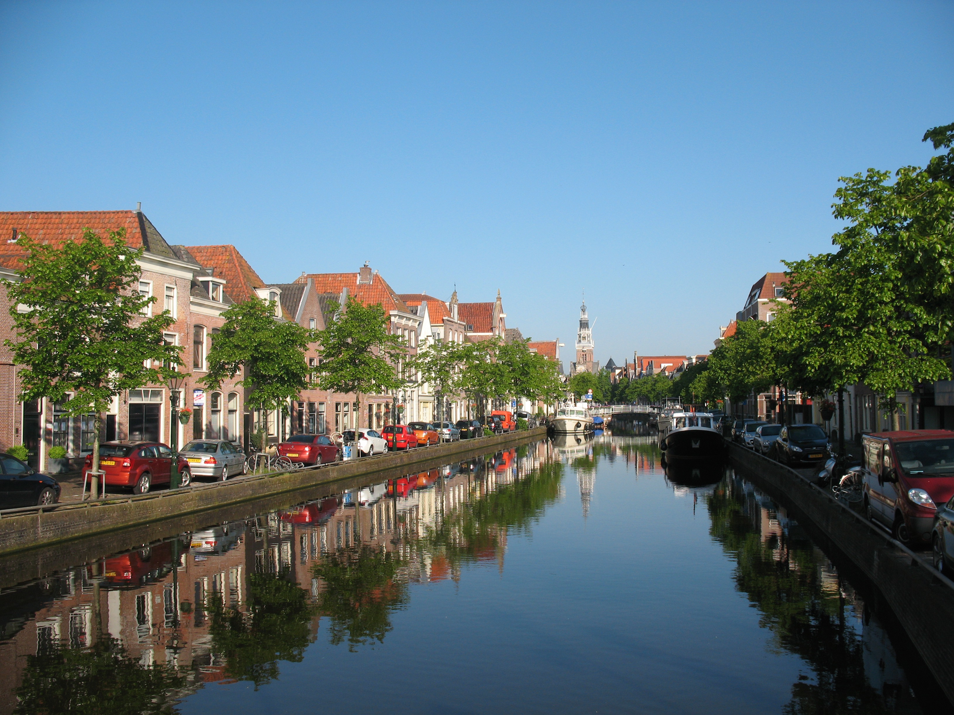 Luttik Oudorp Alkmaar gezien vanaf de Rotorenbrug